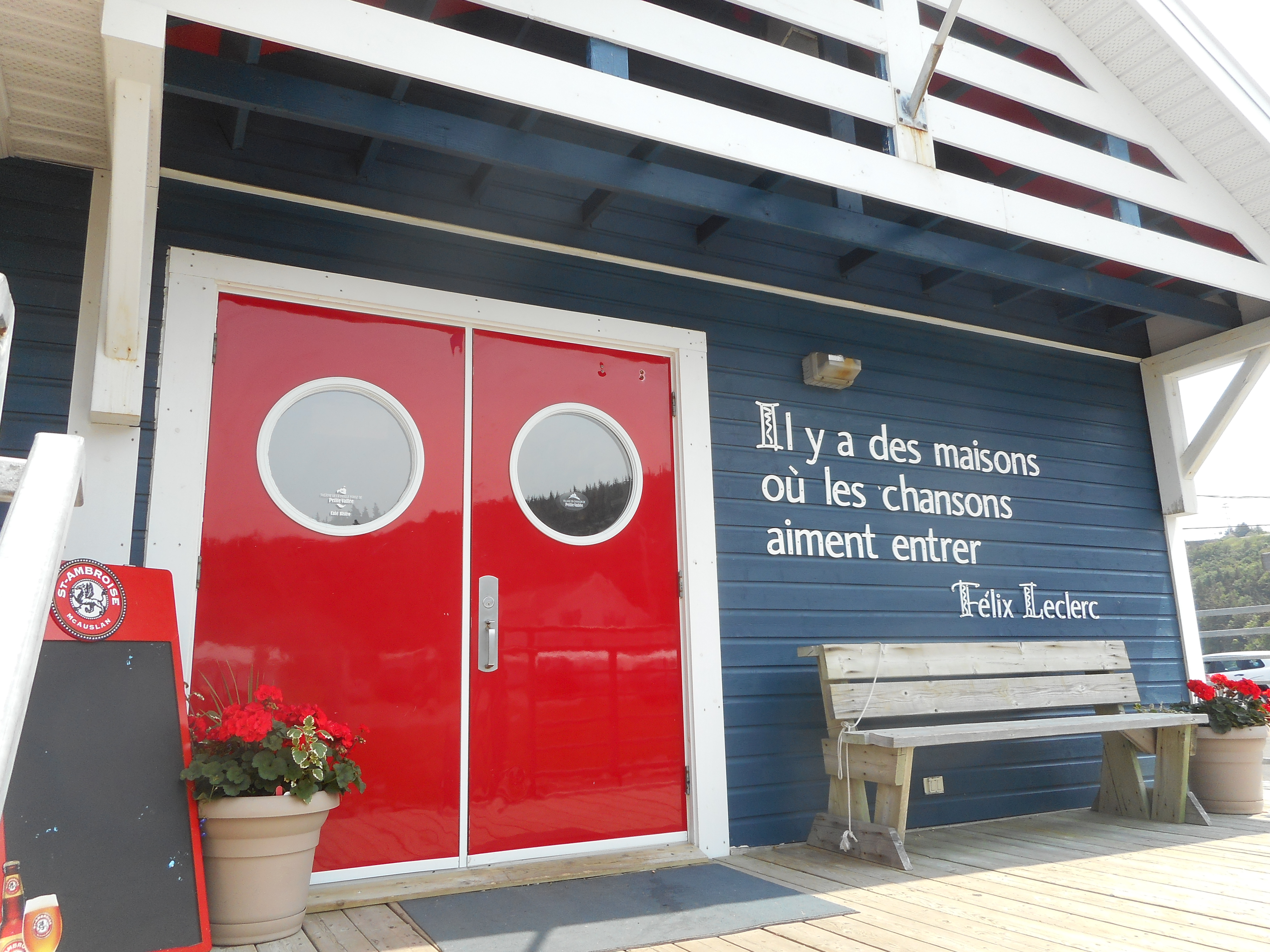 Le Théâtre de la Vieille Forge de Petite-Vallée est une salle de spectacle de Petite-Vallée, au Québec, où a lieu, en juillet, le Festival en chanson de Petite-Vallée. facebook